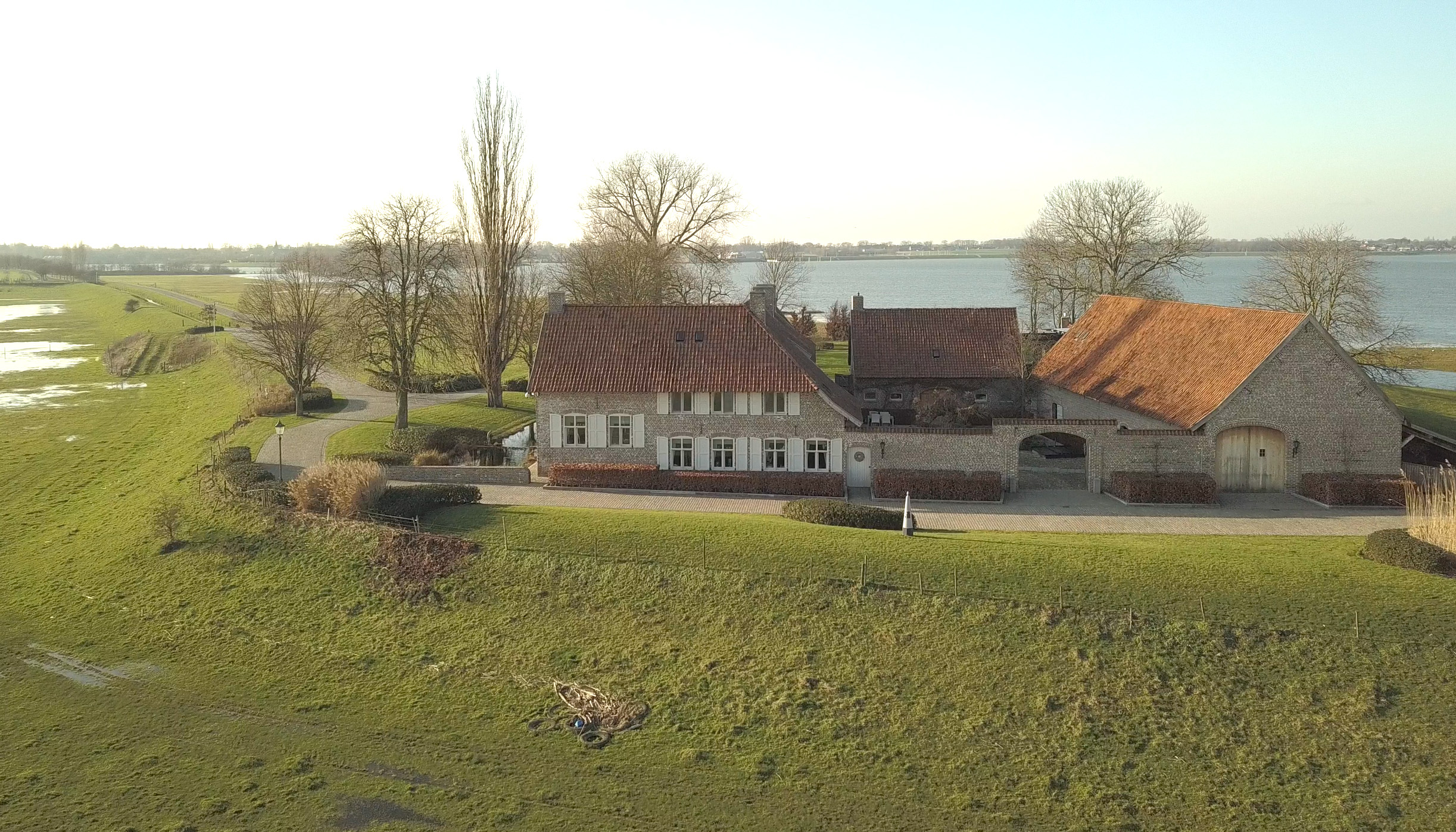 Hoeve Houbenhof is via de weg uitsluitend toegankelijk via de Maasdijk. Op 5 februari 2018 viel het hoge water nog wel mee.